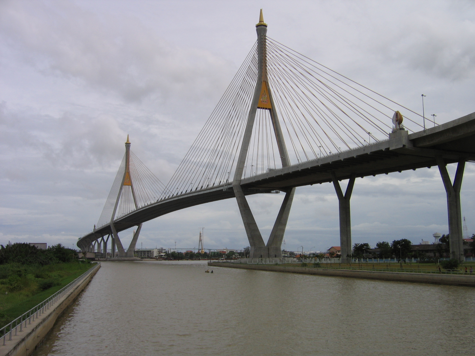 Mega Brigde